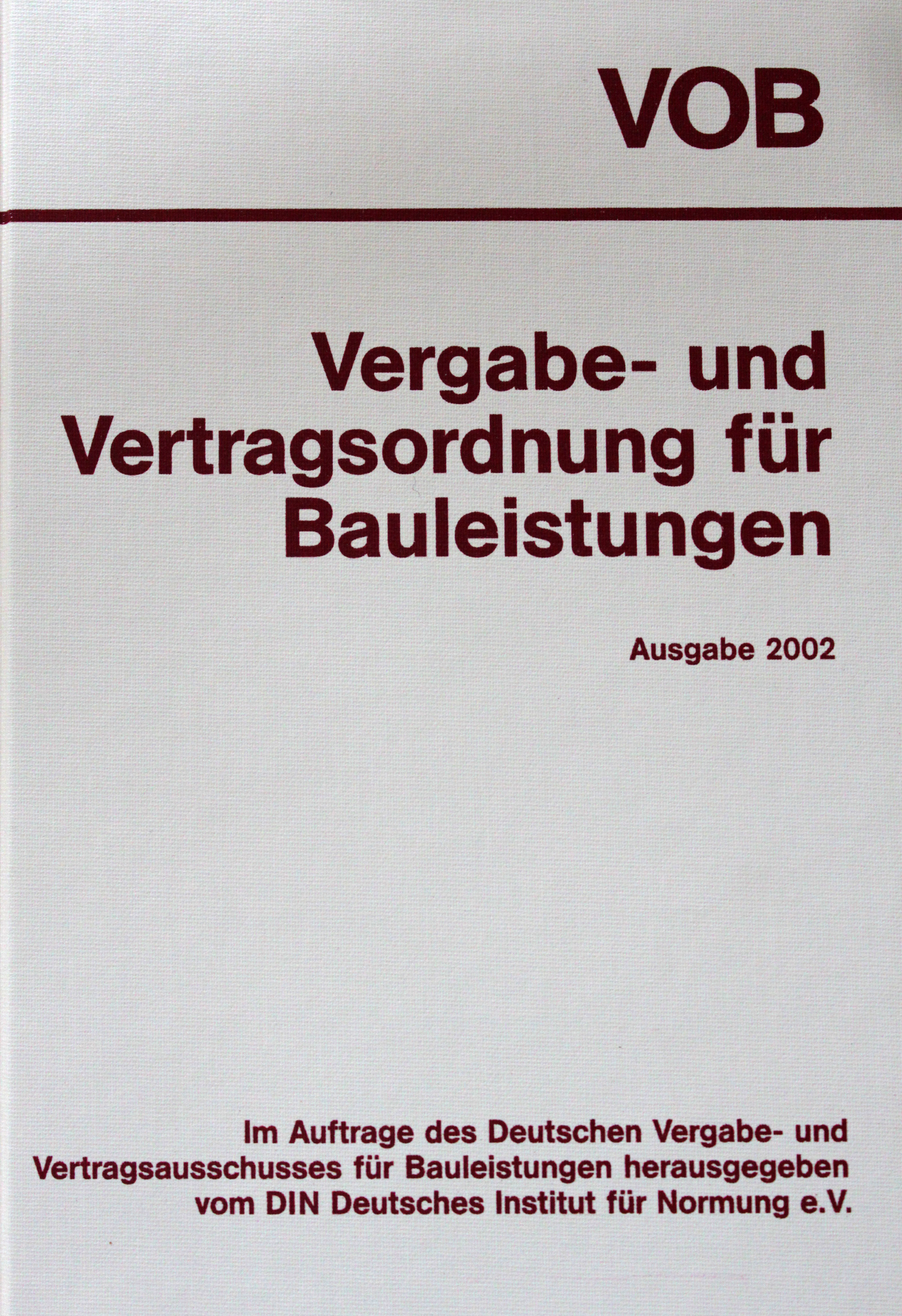 VOB: Vergabe- und Vertragsordnung für Bauleistungen; Ausgabe 2002; Buchcover